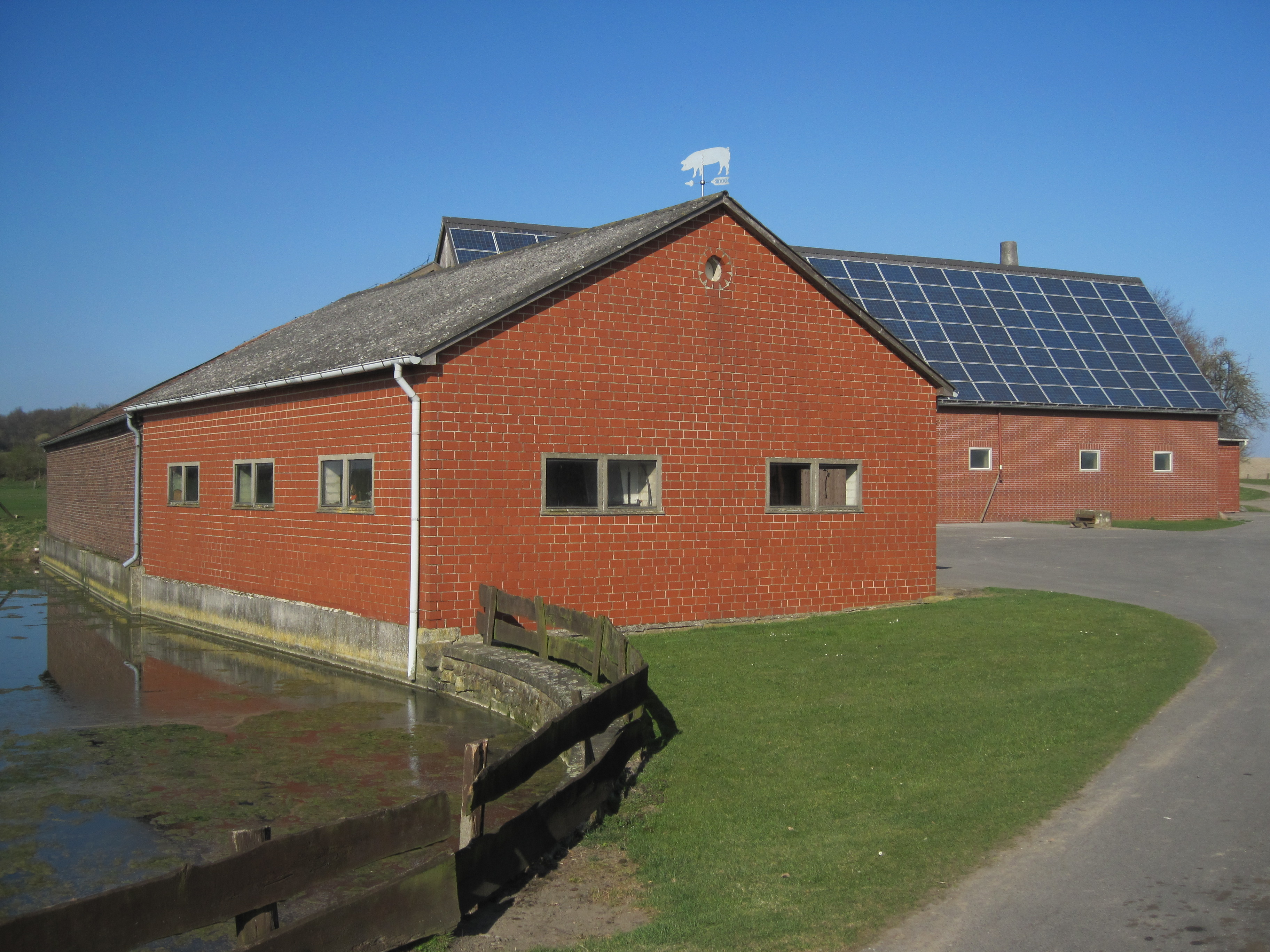 Das Foto zeigt die Umbegung von Haus Hardenberg in Werne-Nordick.